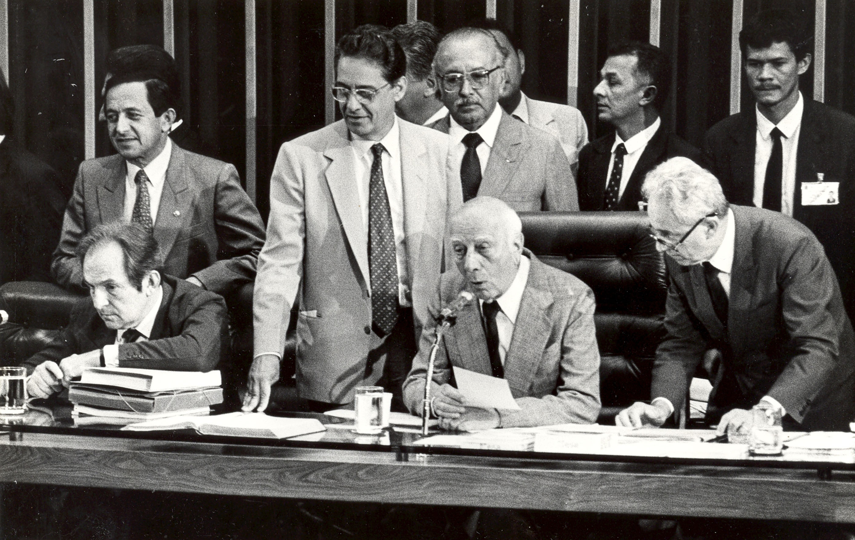 O deputado Ulysses Guimarães conduz o processo de discussão e votação das emendas do texto constitucional, ao lado do então senador Fernando Henrique Cardoso, do deputado Bernardo Cabral e do senador Humberto Lucena. Fotógrafo: Célio Azevedo.